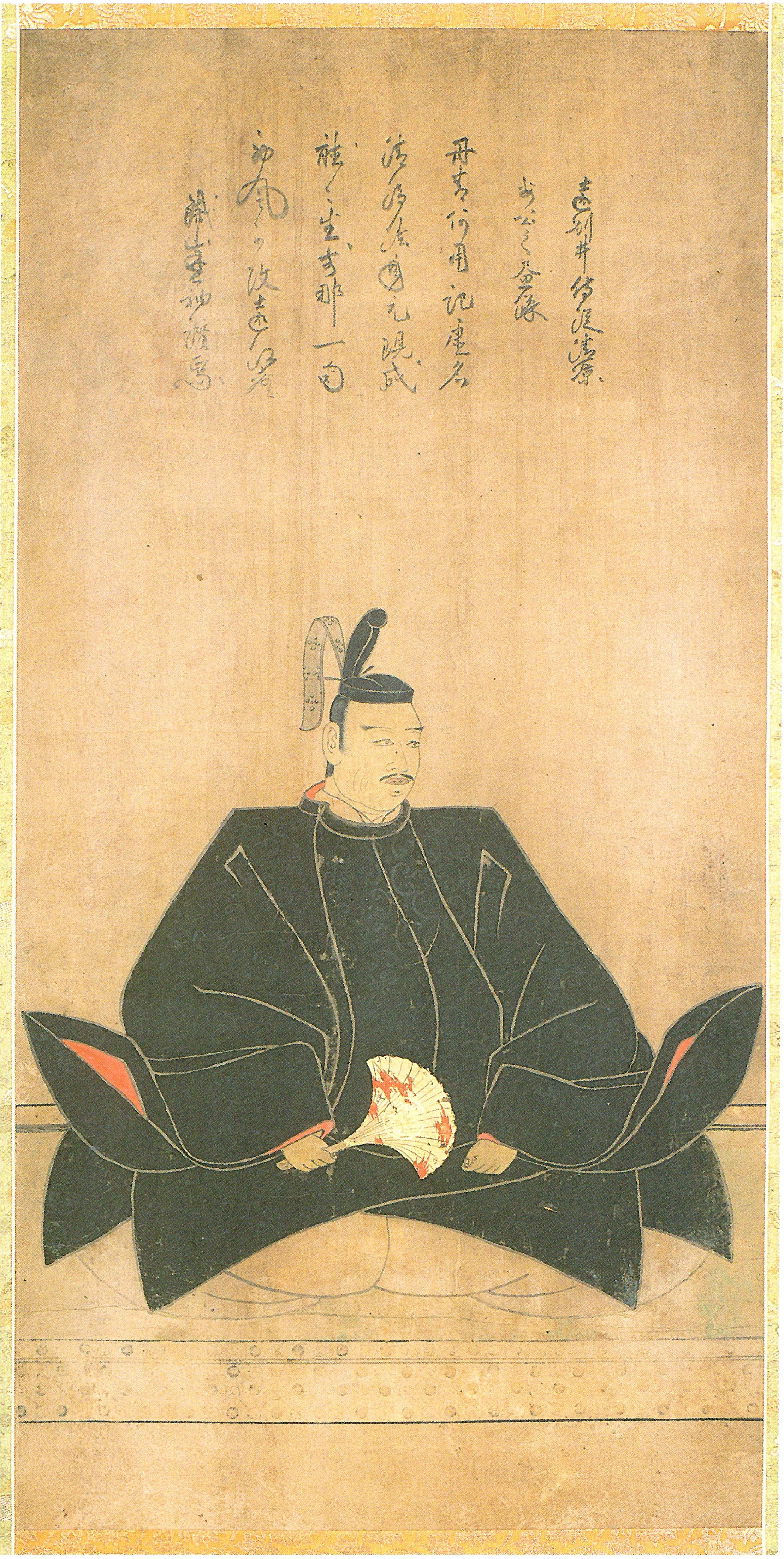 井伊直政。Ii Naomasa.